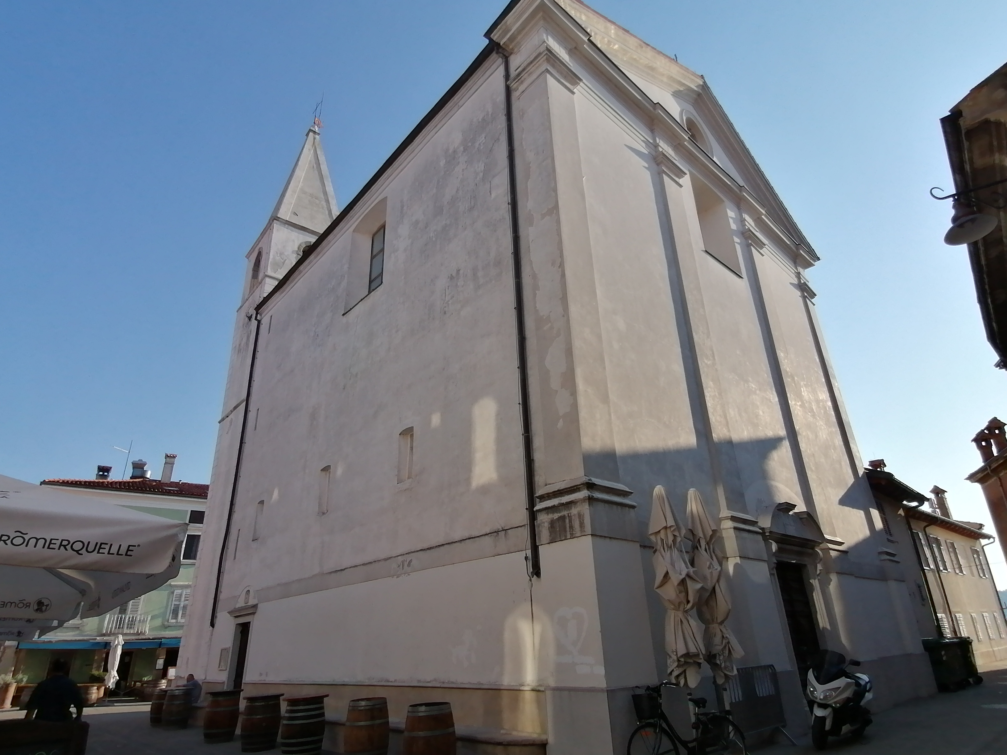 Izola cerkev sv. Marije Alietske